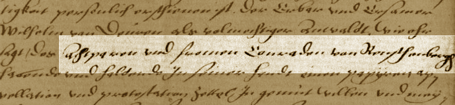 Name als Schriftzug